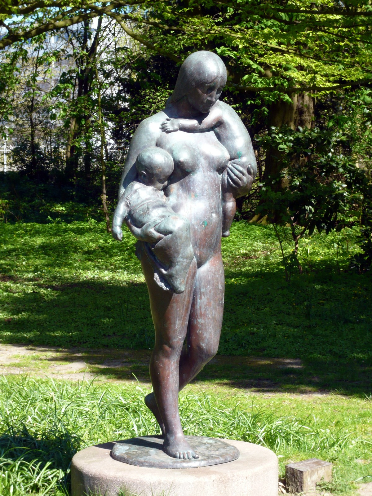 Skulptur Eva und ihre Kinder von Adolf Brütt im Hans-Heinemann-Park in Rendsburg. 1. Abguss der im Jahre 1889 geschaffenen Bronzeskulptur.